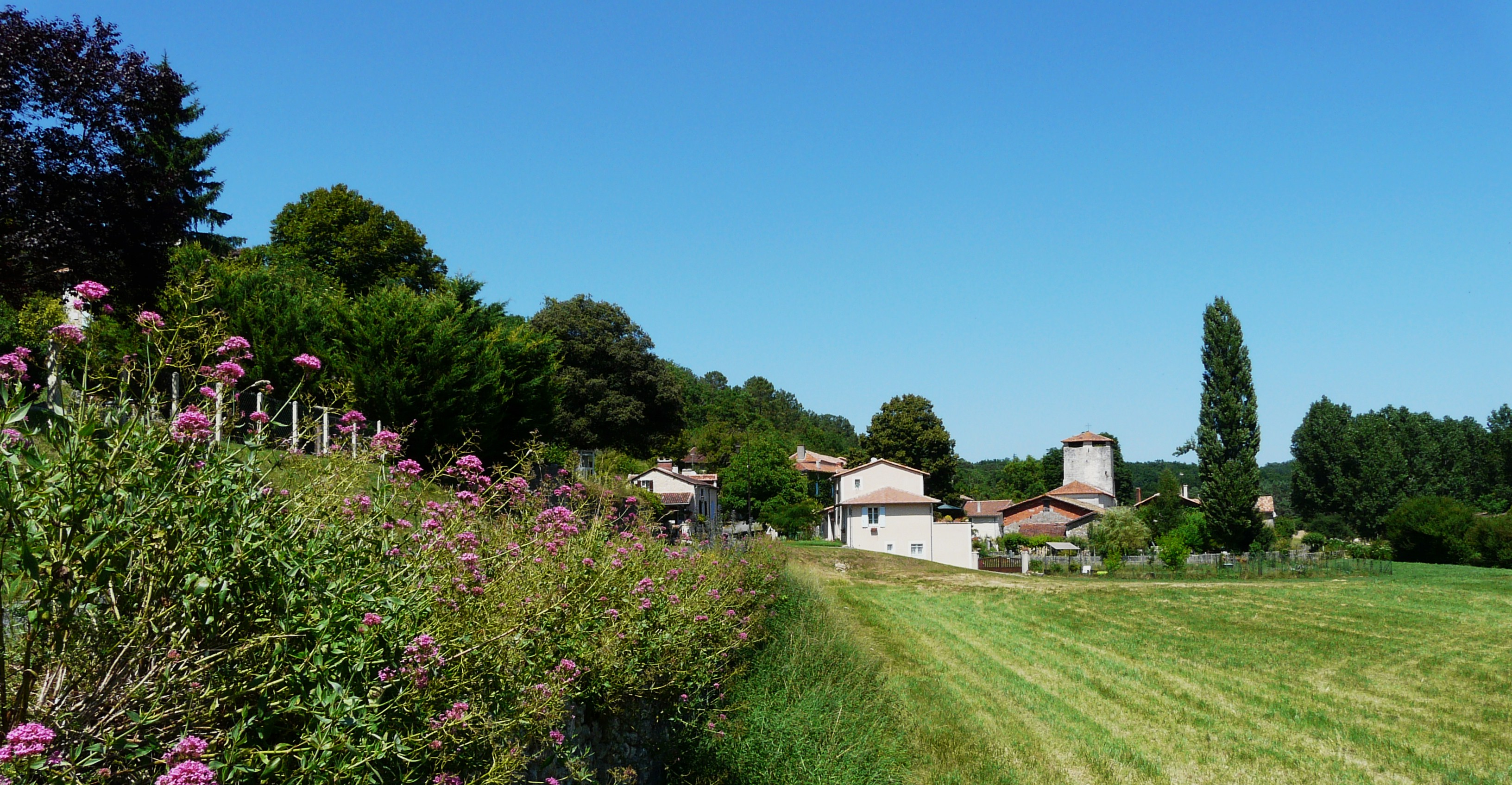 Le bourg de Bussac